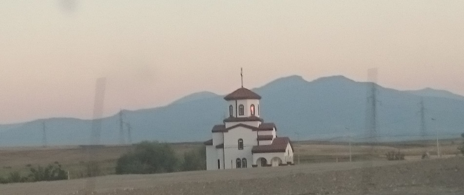 Црква „Св. 40 Маченици“ - Смилковци